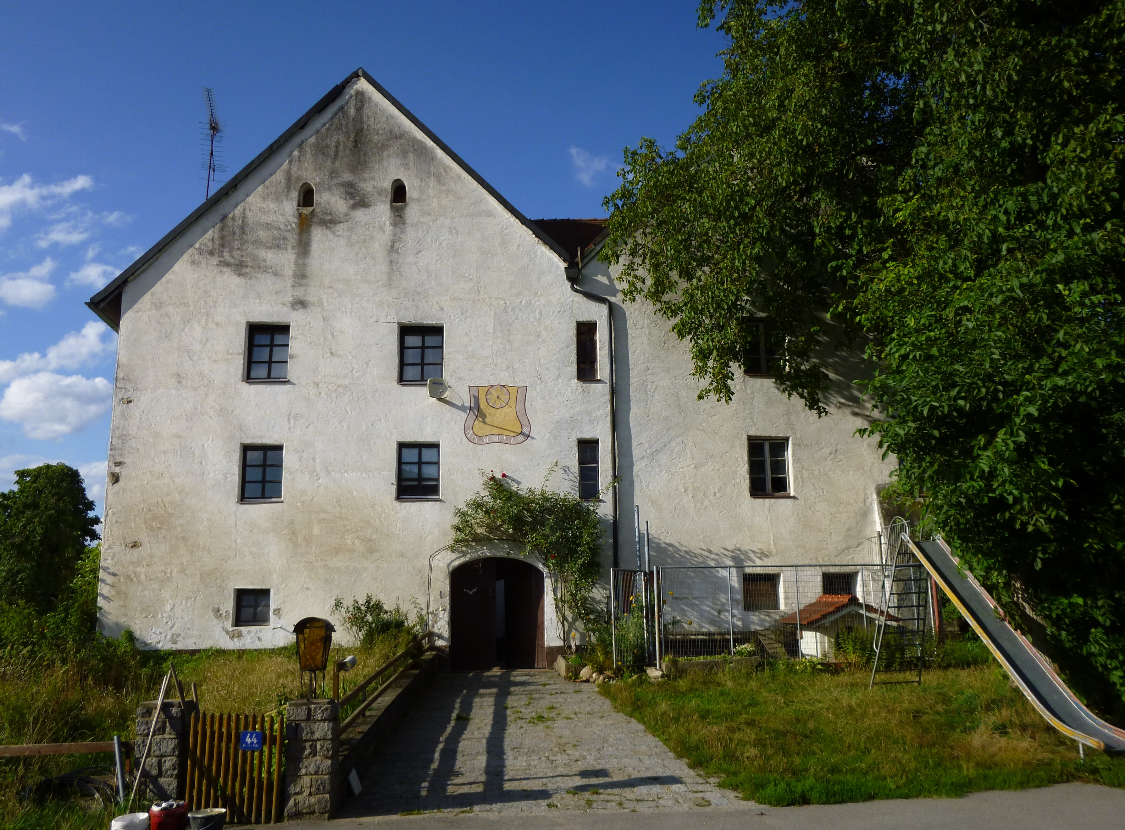 Ehemaliges Wasserschloss in Au vorm Wald bei Hunderdorf; zwei parallele Flügel; Durchfahrt von Süden zum Hof; 16./17. Jahrhundert mit katholischer Schlosskapelle St. Valentin.Liste der Baudenkmäler in Hunderdorf, Landkreis Straubing-Bogen.